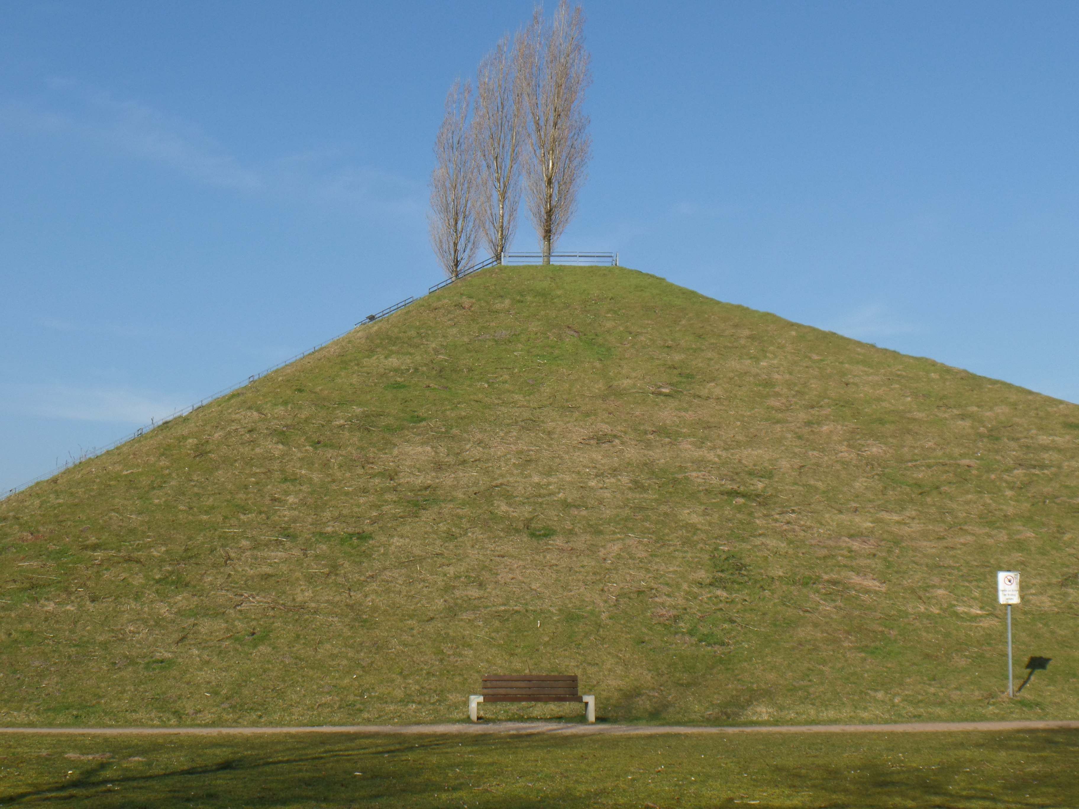 Nordhorn, Wasserstadt Povel